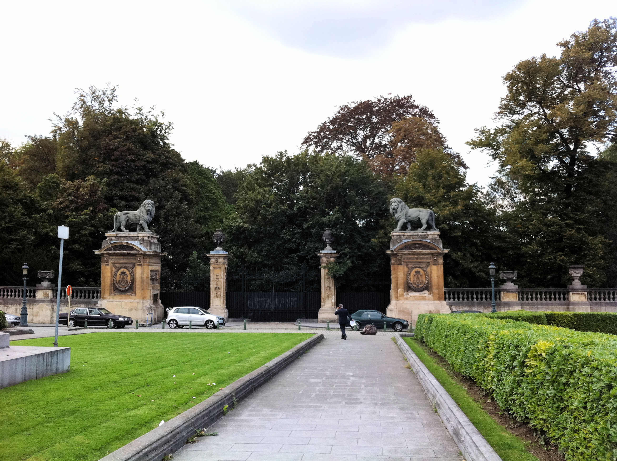 Troonplein, Brussel. Leeuwen rond de afsluiting van het park van het Koninklijk Paleis door Adolphe Fassin